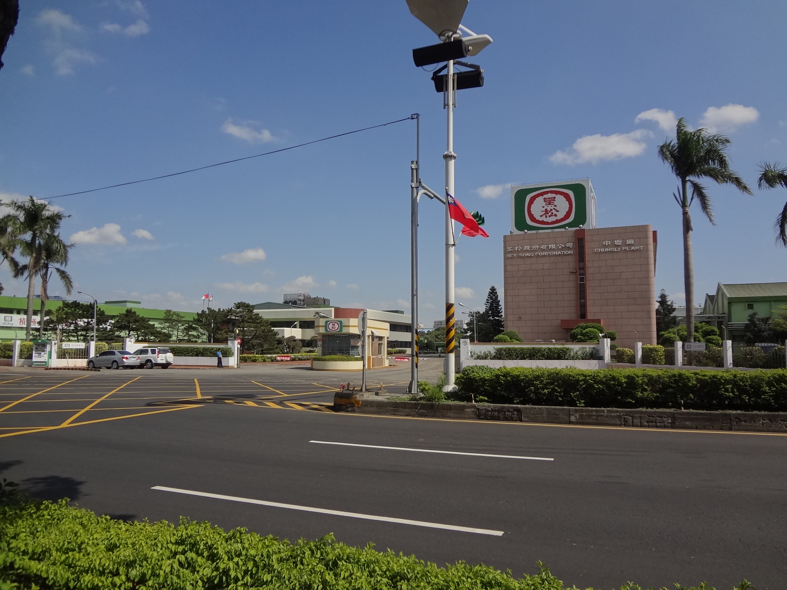 黑松公司中壢廠，位於桃園縣中壢市中園路178號。